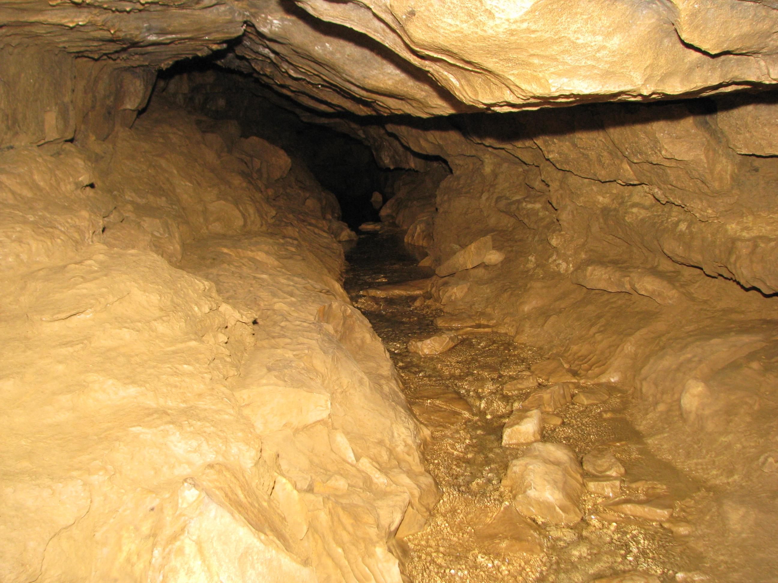 Falkensteiner Höhle im vorderen Bereich.